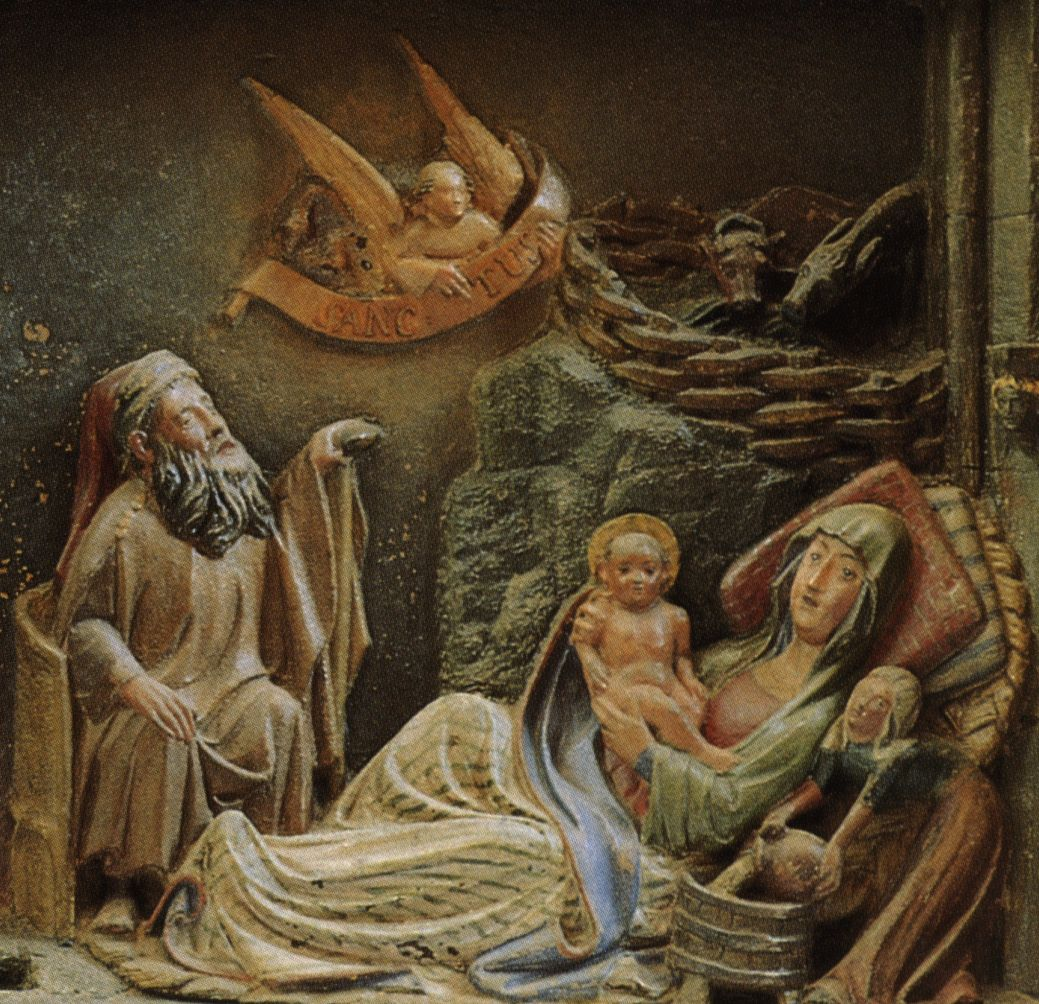 Darstellung der Geburt Christi mit Hebamme, Sandsteinbildnis in der Klosterkirche Neuruppin